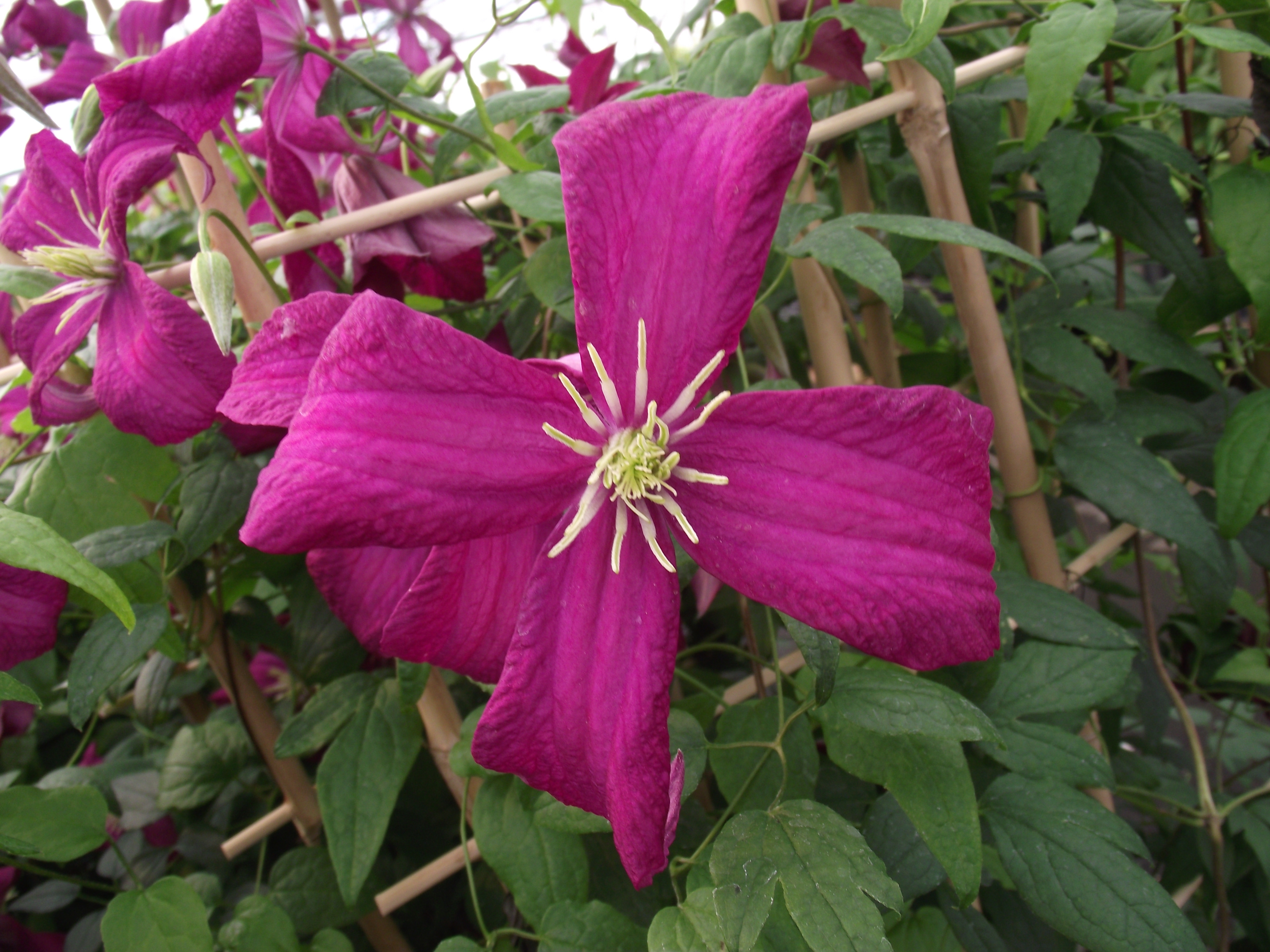 Clematite (Viticella Group) 'Madame Julia Correvon'